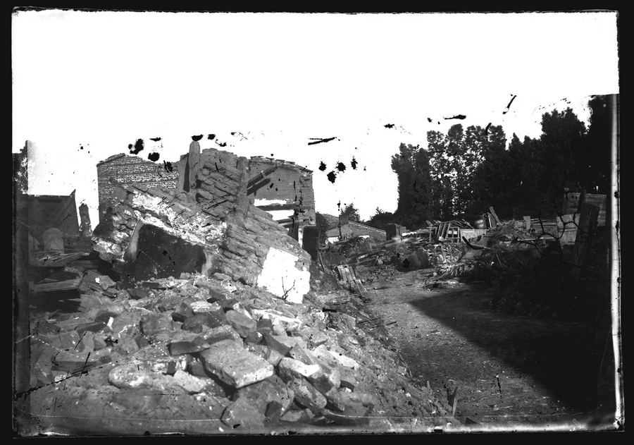 Près de l'avenue de Muret. Eté 1875. Vue d'ensemble de ruines suite à l'inondation des 24 et 25 juin. Au premier plan gravats ; au second plan intérieur de bâtiment en pierre ; ferrailles, arbres.